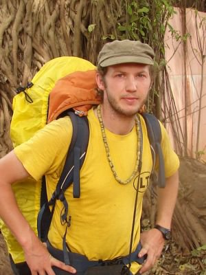 Dainius Kinderis ekspedicijos per Afriką metu.